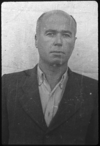 Fritz Becher (* 24. Oktober 1904; † 29. Mai 1946 in Landsberg am Lech) war Funktionshäftling im KZ Dachau. Becher wurde im Dachau-Hauptprozess zum Tode verurteilt und hingerichtet.